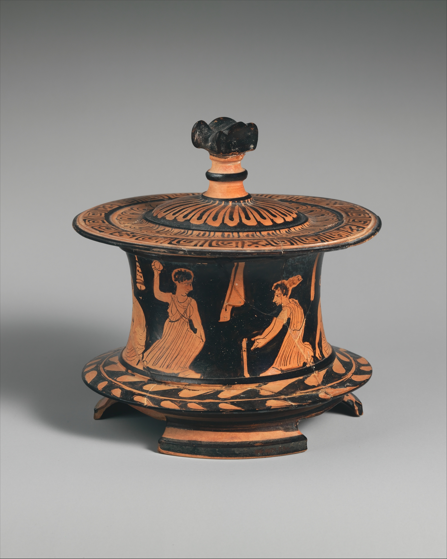 Pyxis attique à figures rouges, MET (inv. 06.1021.119a, b) sur laquelle sont représentées des femmes jouant. Le bouton de préhension du couvercle est en forme d'astragale.